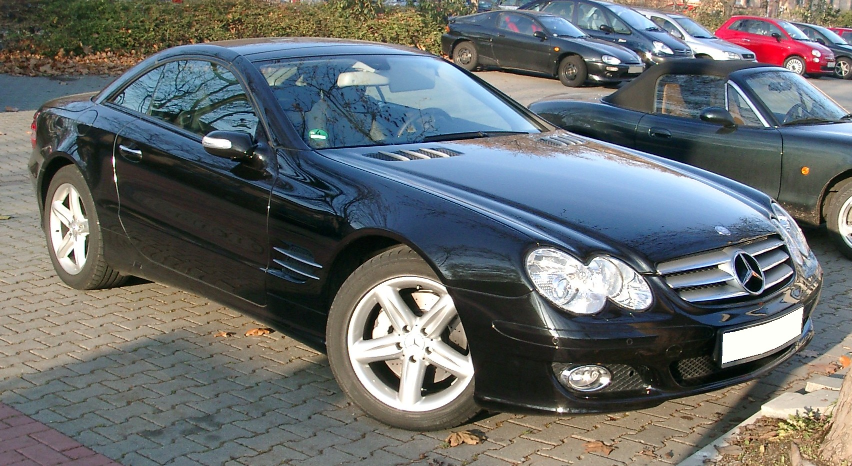 Mercedes-Benz R230